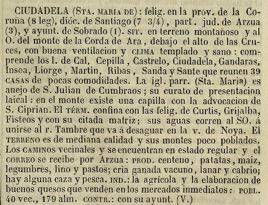 A Ciadella no Diccionario geográfico-estadístico-histórico de España y sus posesiones de Ultramar.